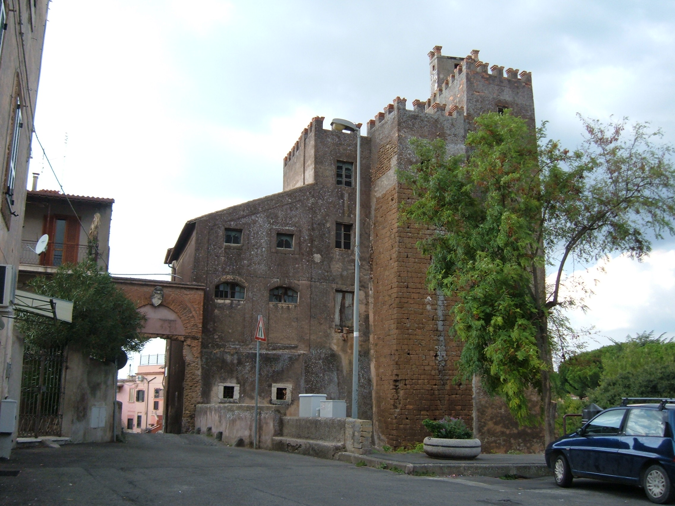 San Vittorino Romano, comune di Roma.